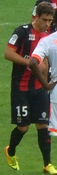 Grégoire Puel